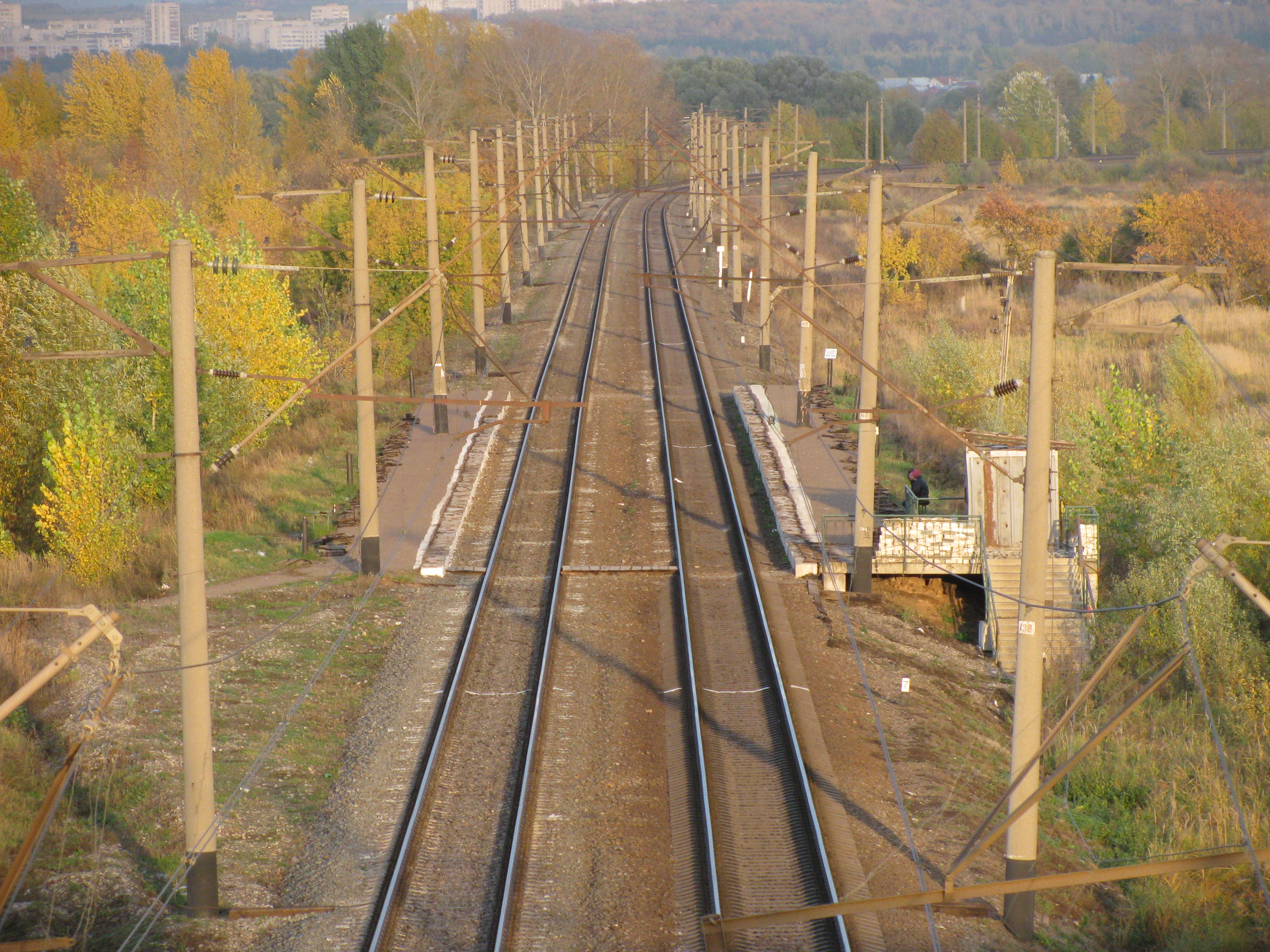 Платформа 797 км.